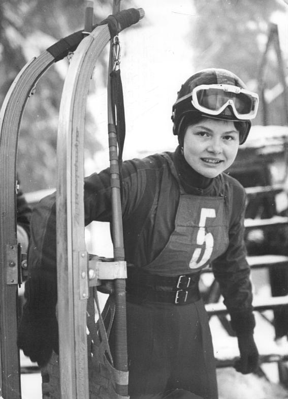 Ortrun Enderlein Zentralbild Studre´ Pr-15.2.1965-Deutsche Meisterschaften im Rennschlitten am 14.2.1965 in Oberhof-Ortrun Enderlein (SC Traktor Oberwiesenthal) holte sich im Frauen-Einer den Meistertitel.